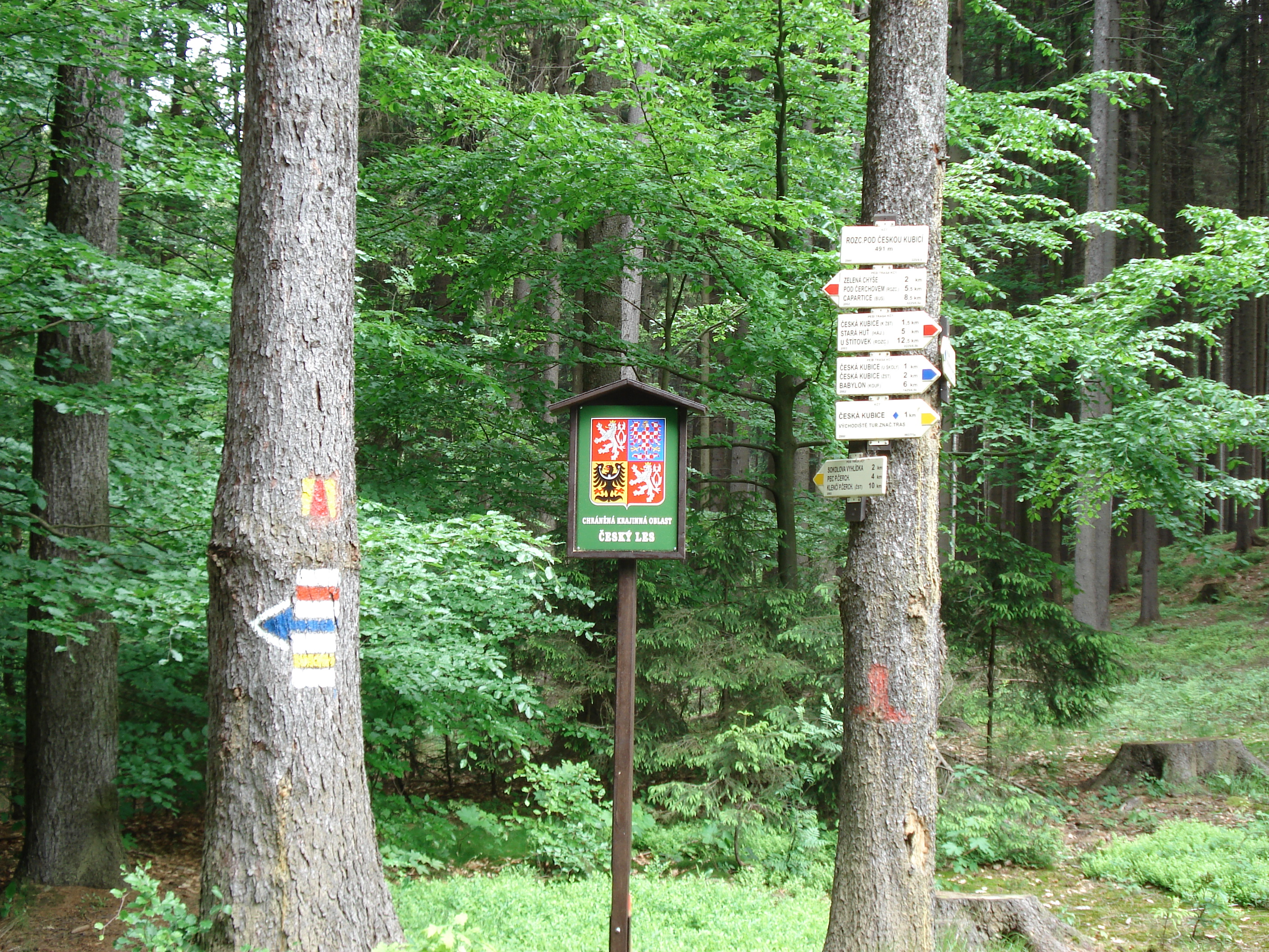 Description Vue d'un des panneaux indiquant l'entrée dans la zone protégée des Český Les DateJune 2006SourceOwn work by the original uploaderAuthorCevenol2 Vue d'un des panneaux indiquant l'entrée dans la zone protégée des Český Les